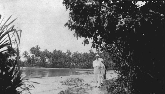 Foto. Bezoek van de Resident van Batavia, de Roo de la Faille, aan Poeloe Klappa, één van de Duizend eilanden in de Baai van Batavia